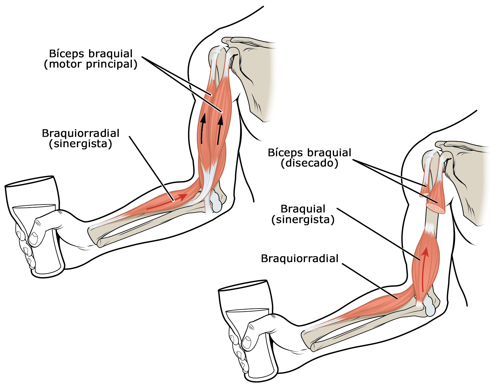 Esquema en el que se muertra el funcionamiente de un músculo y su agonista.